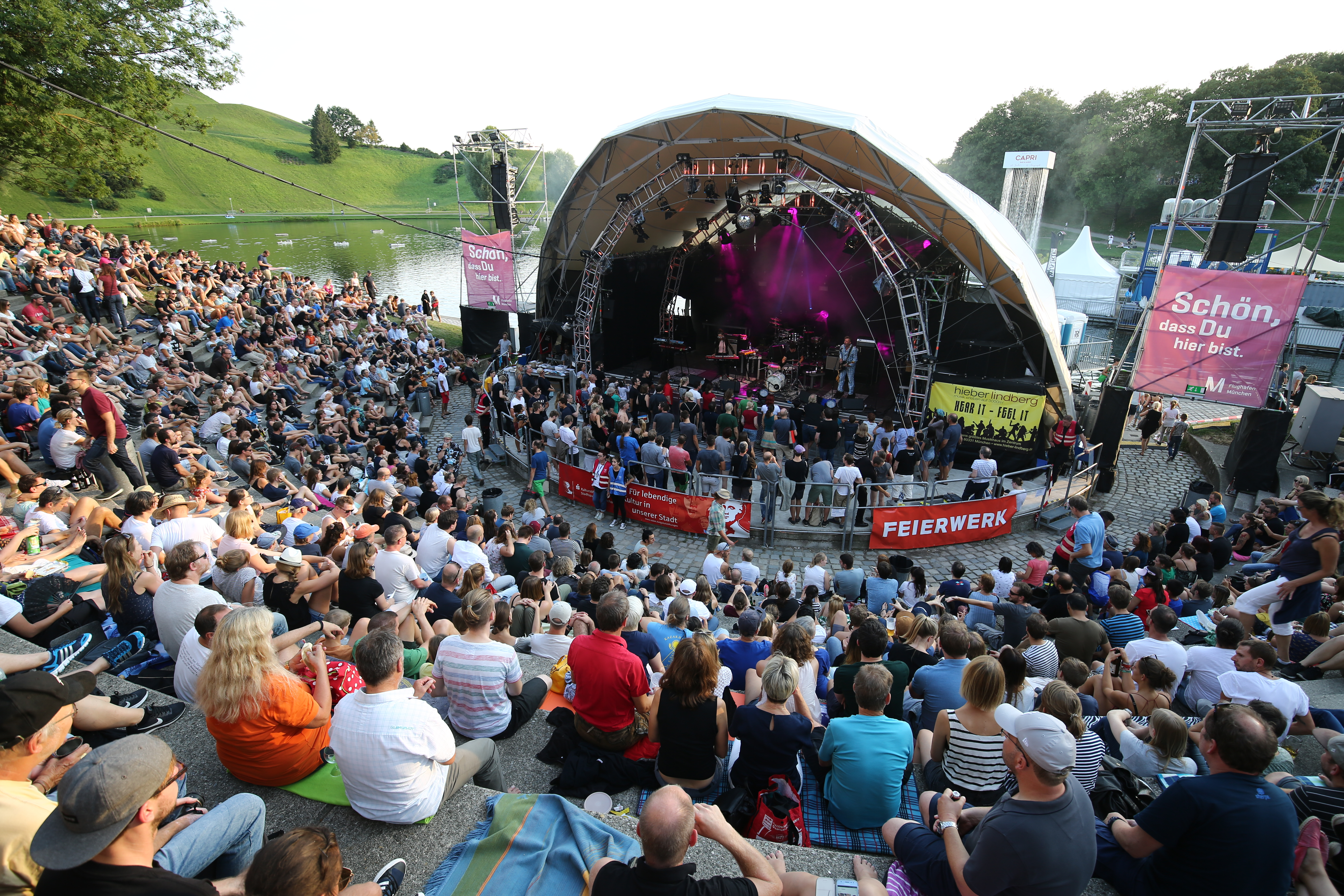 Fortuna Ehrenfeld, Liedermacherpop für Erwachsene aus Köln, am 2018-08-17 im Münchner Theatron.